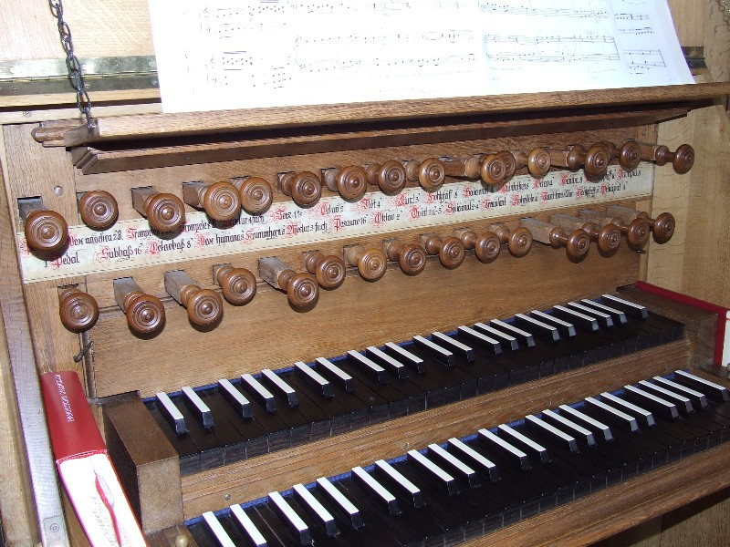 Simultankirche